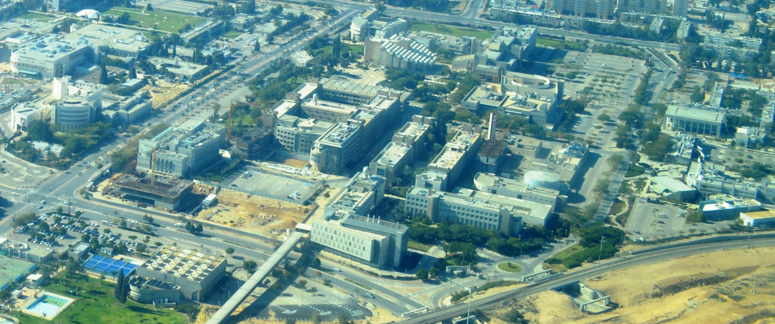 קמפוס אוניברסיטת בן גוריון, מרכז הספורט האוניברסיטאי, גשר מכסיקו המקשר בין הקמפוס לתחנת הרכבת באר-שבע צפון ובית הספר למדעי הבריאות